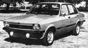 Opel K-180 "Rally". Imagen solicitada a la página web propietaria de esta fotografía, para su publicación tal como lo exigen las leyes de Copyright